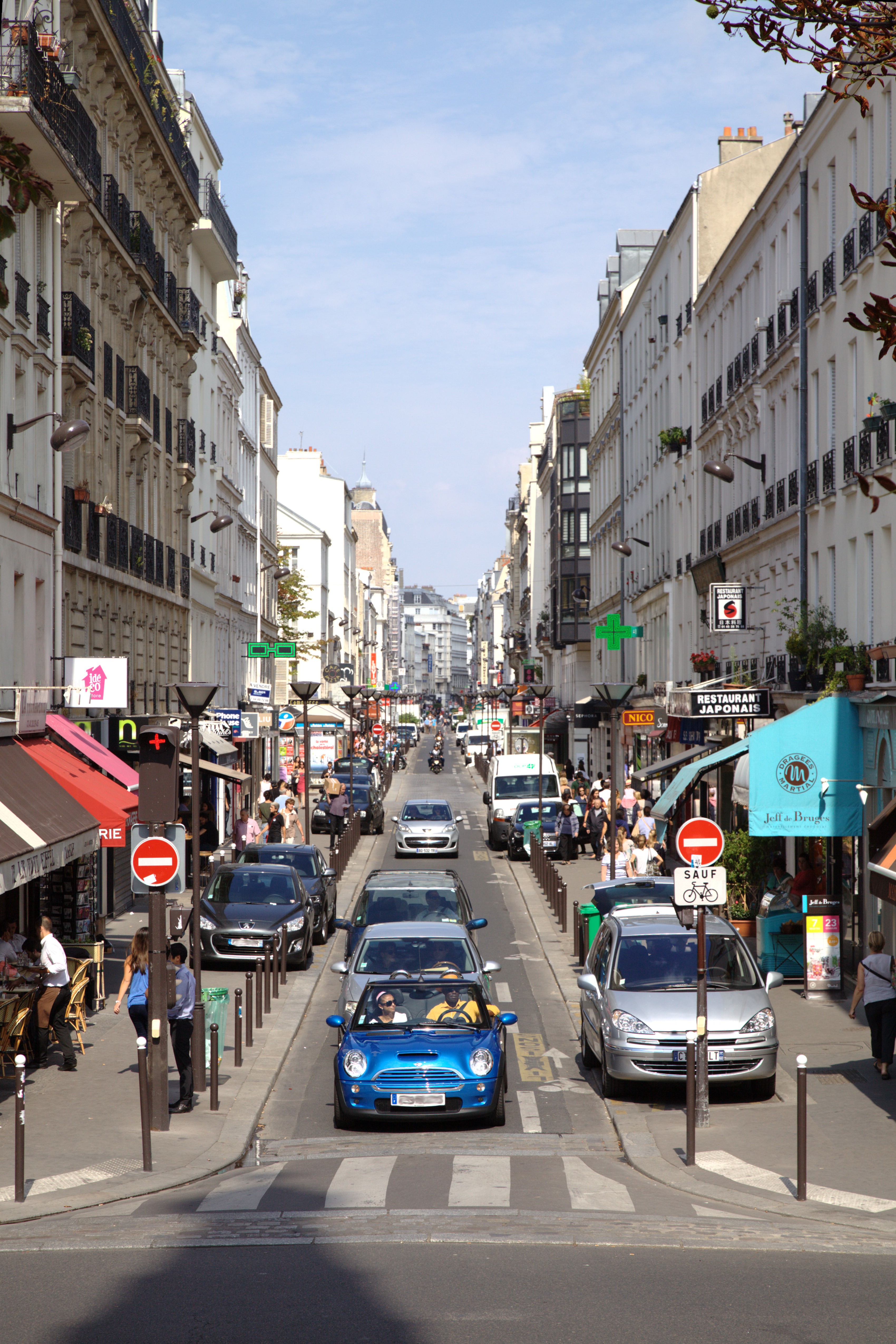 La Rue Du Commerce à Paris, vue depuis l'église Saint Jean Baptiste de Grenelle